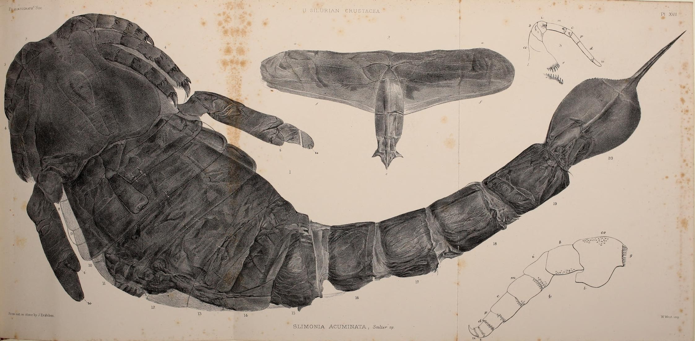 R^fiONTOCRAPH 1 Soc PI XVII ■i 1 »i Lorn by I Erfleben SLIMONIA ACUMINATA, Salter- sp